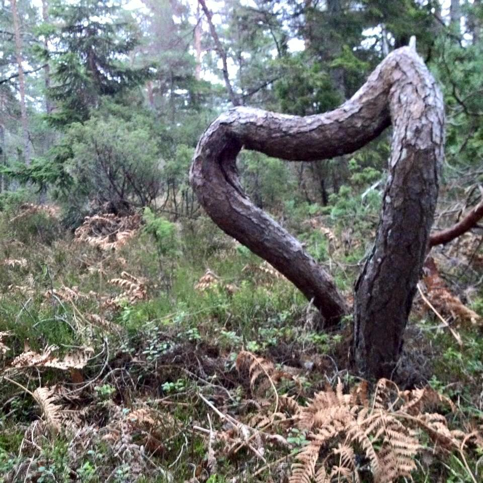 Tall i Ojnareskogen, fotograf Lisa Wanneby